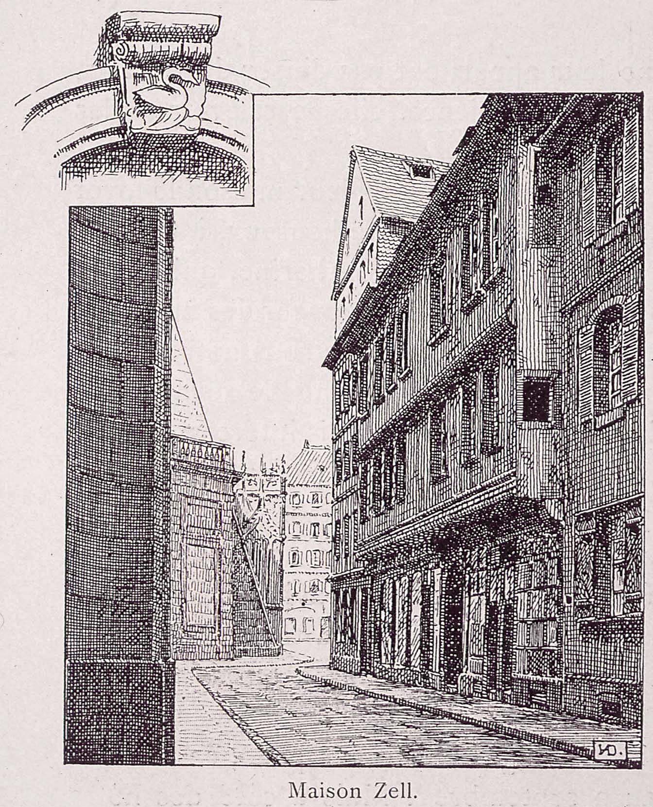 Résidence de Mathieu et Catherine Zell, près de la rue des Juifs à Strasbourg.